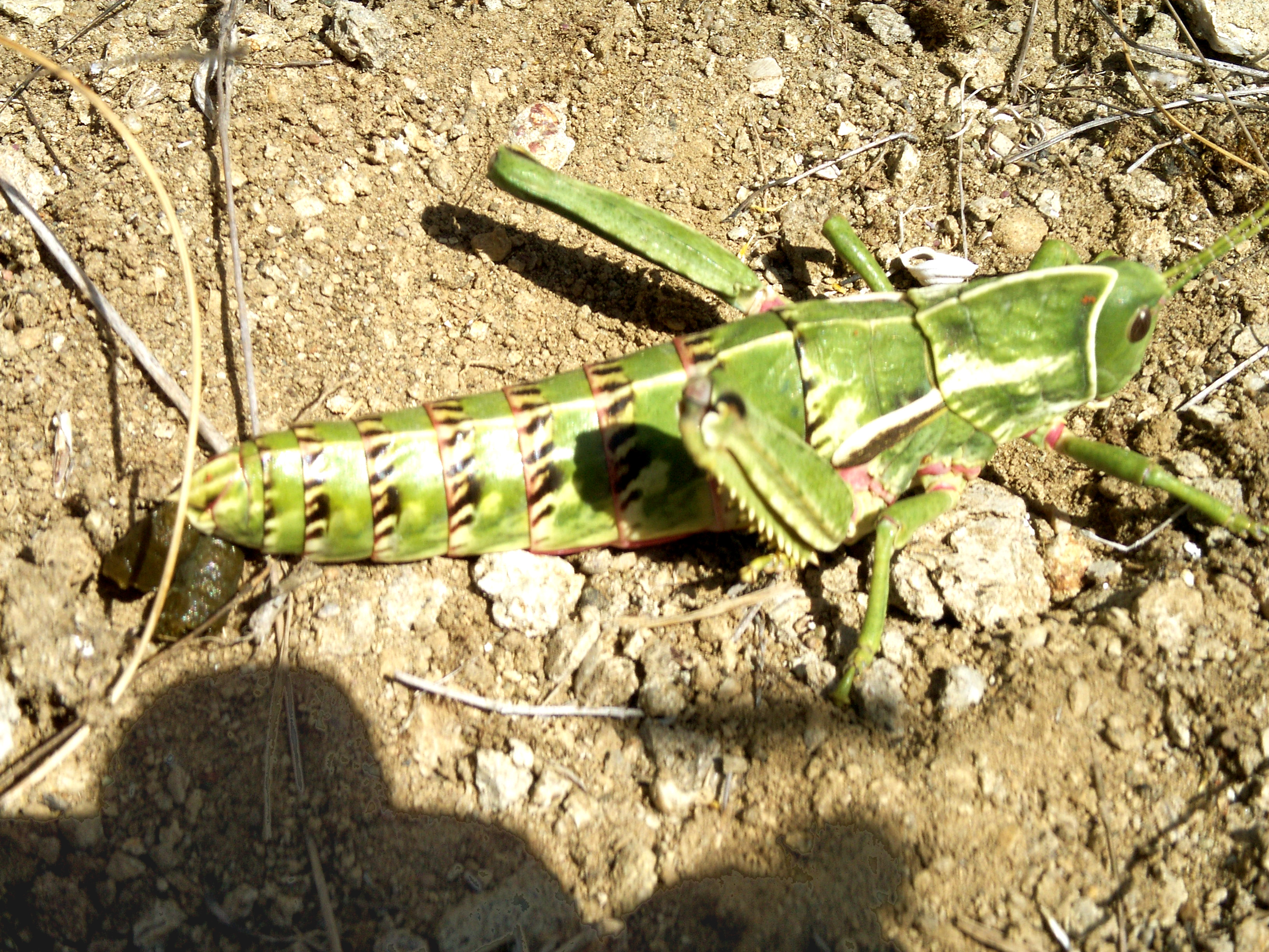 Pamphagus sp., a Nureci (OR), Sardegna.Verosimilmente Pamphagus sardeus, unica specie presente in Sardegna.